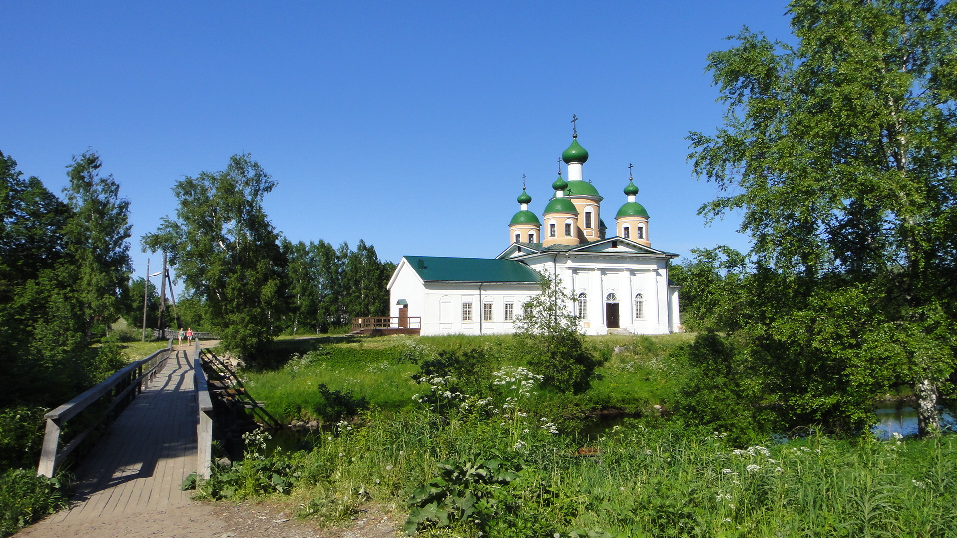 Церковь смоленской иконы божией матери (Республика Карелия, Олонец, город олонец)